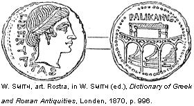 Rostra